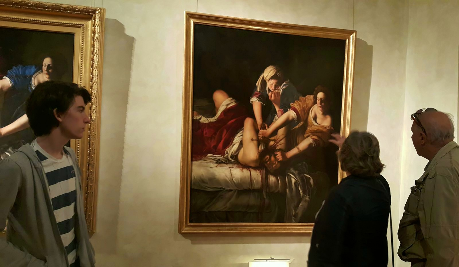 Un gruppo di persone stupefatte dall'espressività della Giuditta che decapita Oloferne degli Uffizi. A sinistra si scorge anche la redazione di Capodimonte.